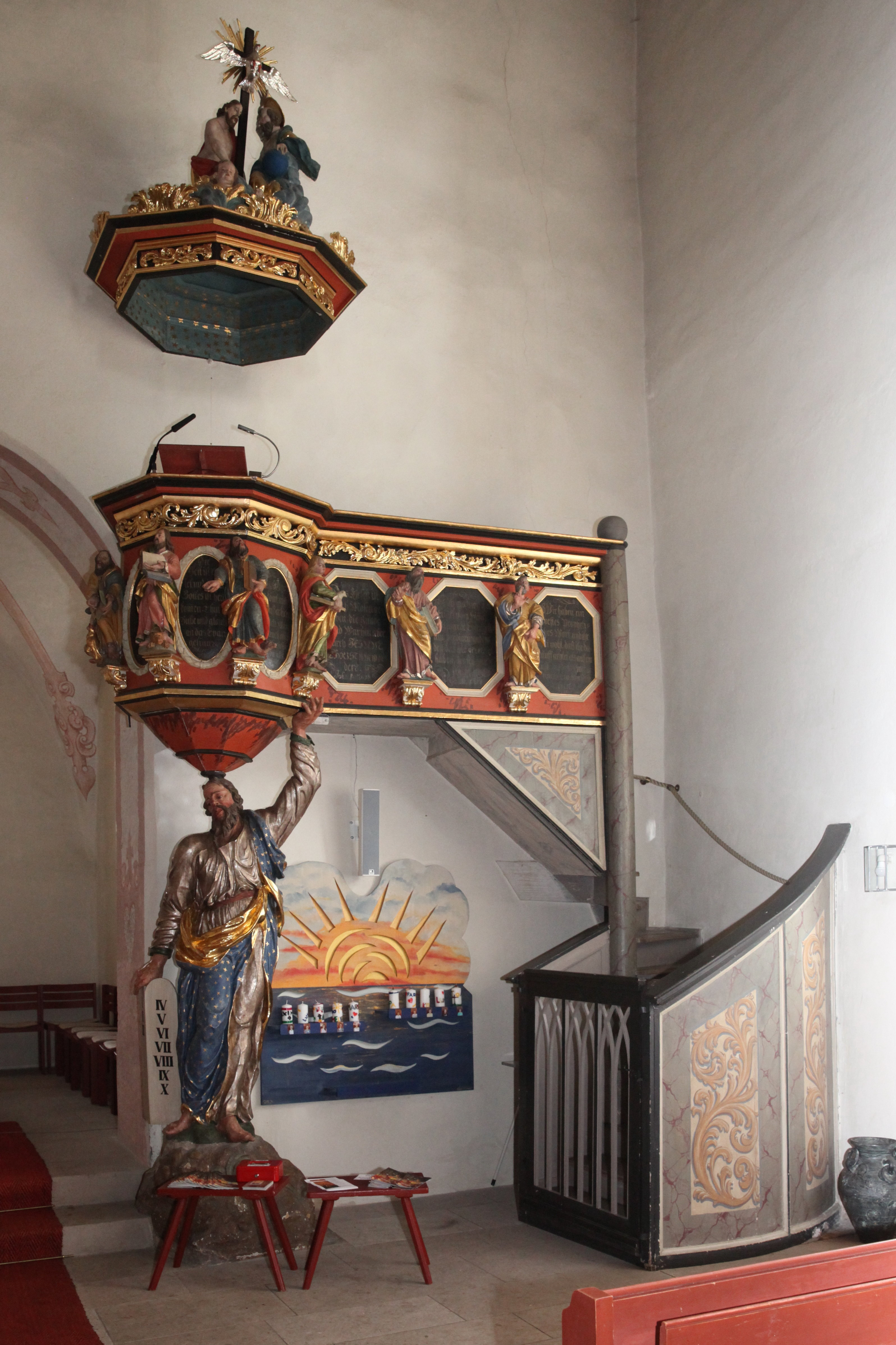 Moseskanzel, Evangelische Pfarrkirche in Scherneck